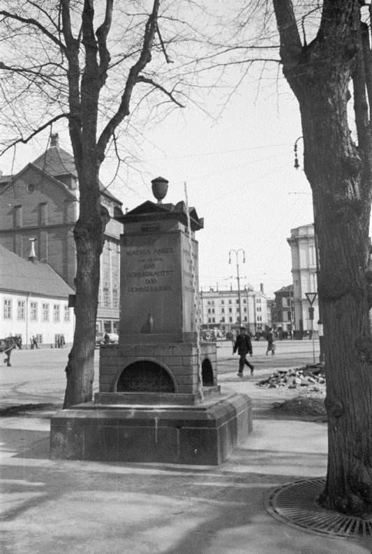 Minnesmerke over Mathia Anker (Bernt Ankers hustru), laget av C.F. Stanley (avduket 1803). Reist i Paléhagen, senere flyttet til nordsiden av Oslo Bymuseum. Strandgata mot Østbanen. Paleet til venstre.